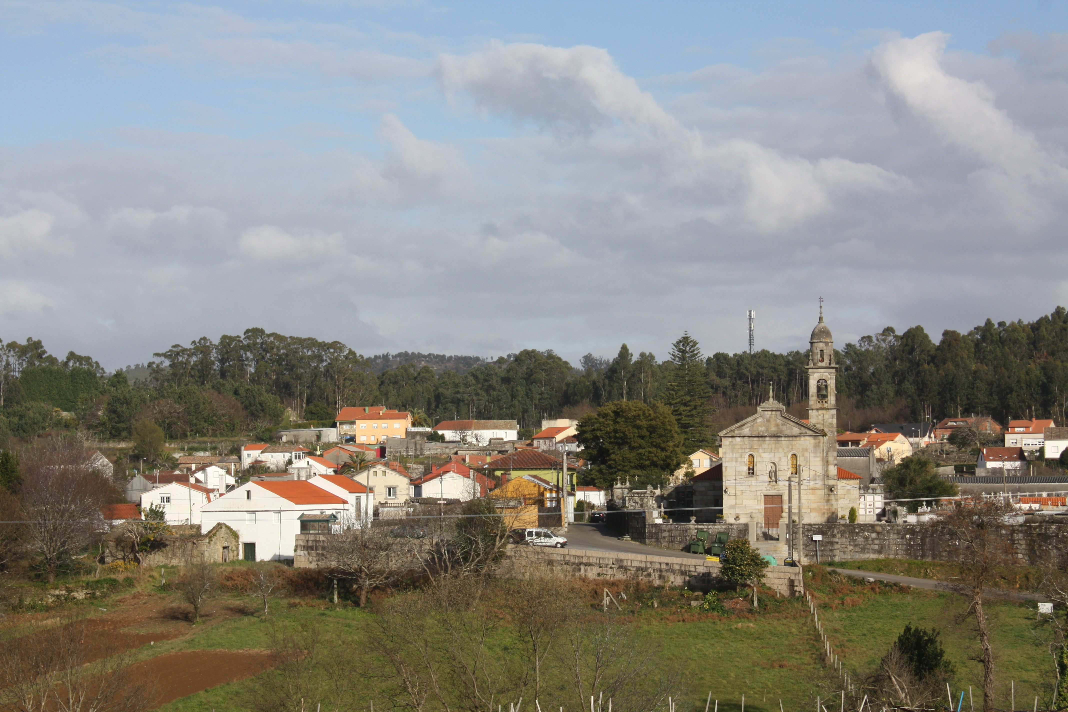 Vista xeral de San Pedro de Cornazo, Vilagarcía de Arousa (Pontevedra)